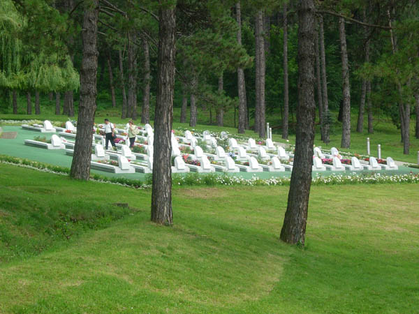 Memorijalni kompleks "Slana banja".